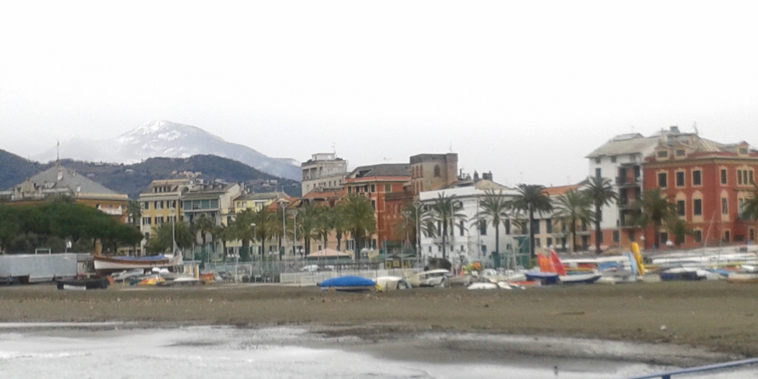 Panoramo de la urbeto Sestri Levante (Ligurio, Italio) dum vintro, kun vidaĵo de la plaĝo kaj sur la fono la neĝmakulitaj montoj.